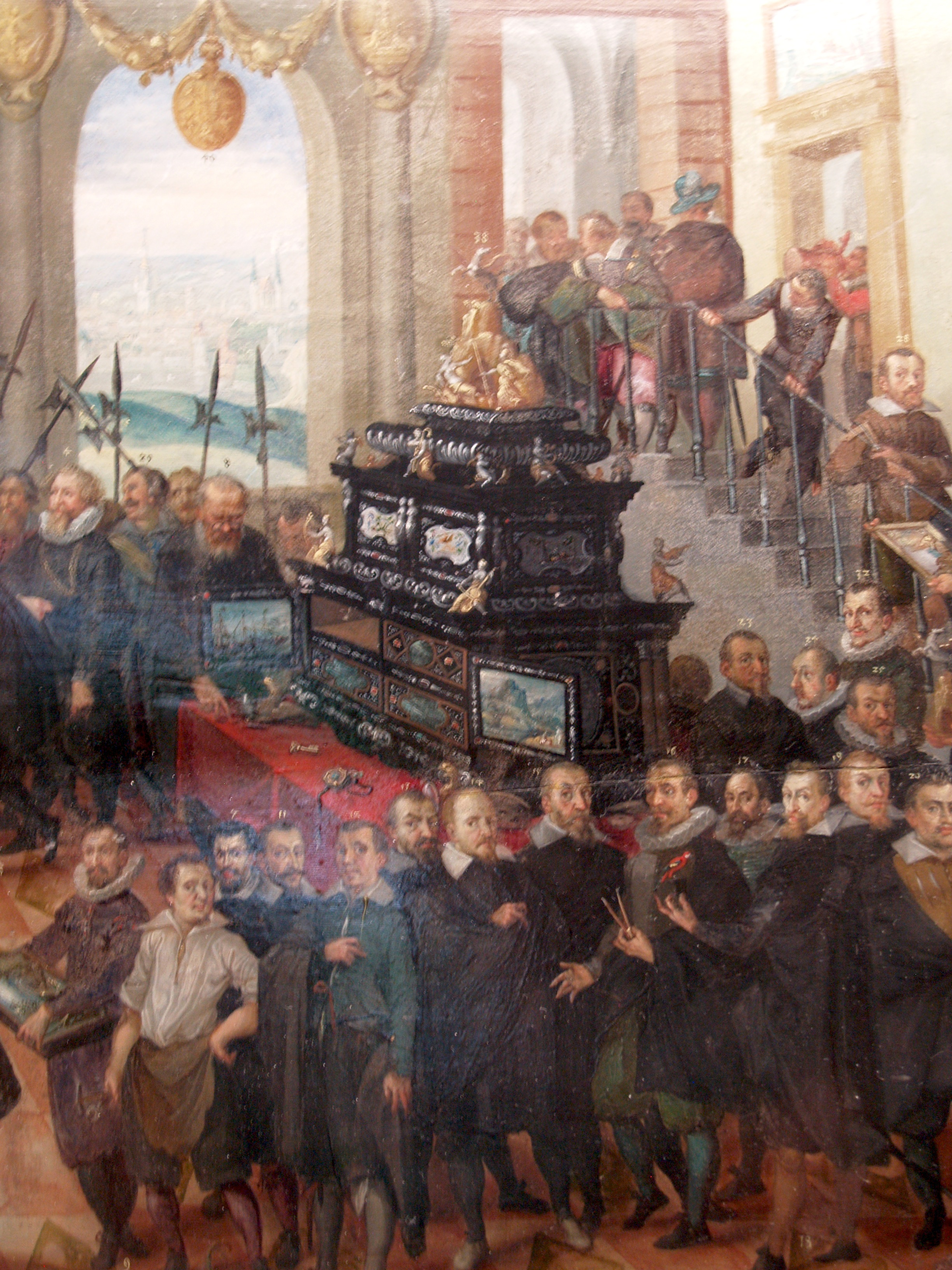 Berlín. Museo de Artes Decorativas. Gabinete de Pomerania.